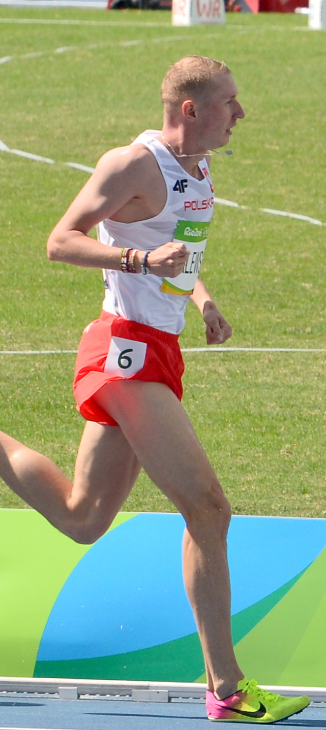 Série du 3000m steeple Homme des JO de Rio, 2016